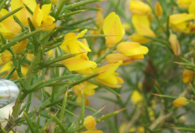 Ulex Parvoflorus